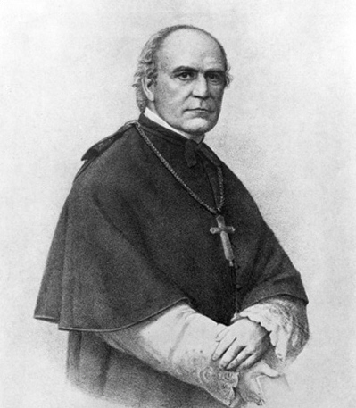 Wilhelm Emmanuel von Ketteler, Bischof von Mainz und Mitbegründer der Deutschen Zentrumspartei.